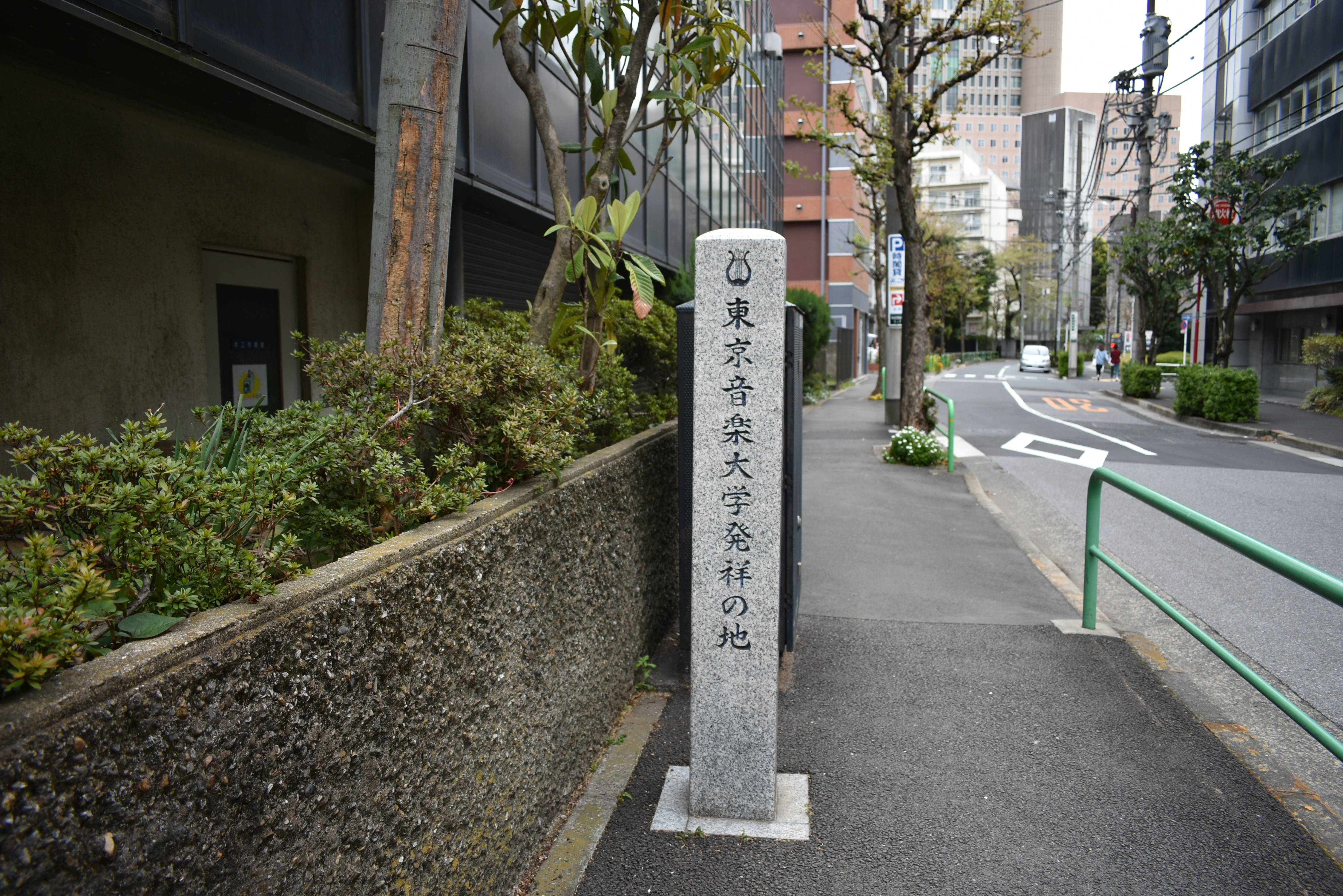 「東京音楽大学発祥の地」の石碑。千代田区神田猿楽町1丁目7番。 Nikon D3400 Ik heb de GPS coördinaten toegevogd. De foutenmarge moet tussen ±5 meter liggen. --トトト (talk) 06:22, 15 April 2019 (UTC)